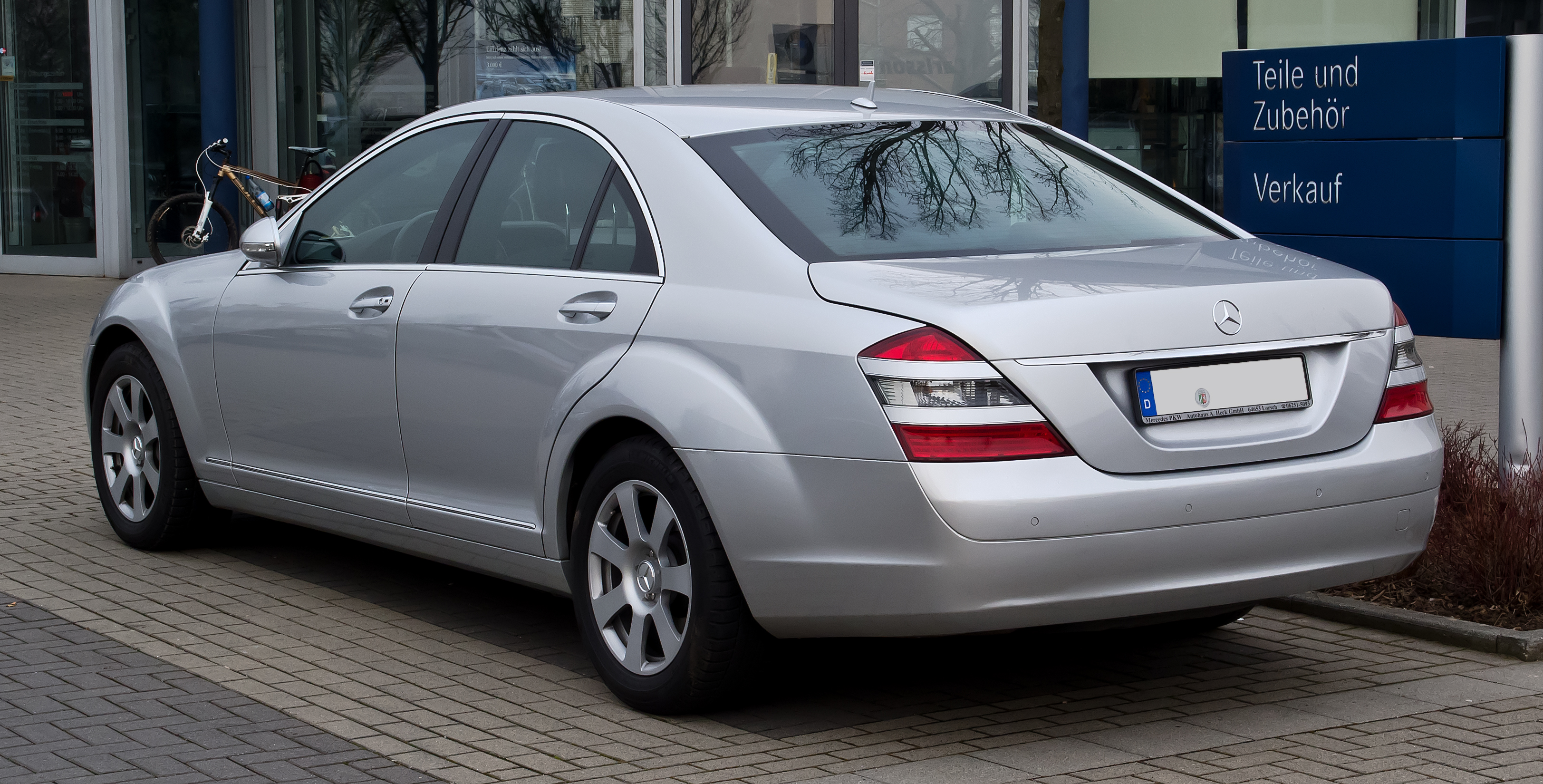 Mercedes-Benz S-Klasse (W 221)